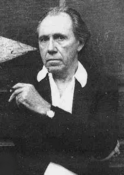 Il poeta Nelo Risi Da "Tuttolibri", 10 ottobre 1991